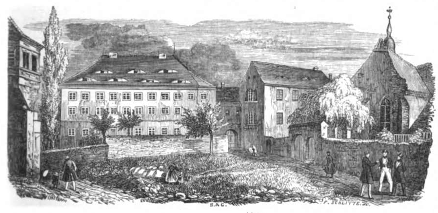 St. Afra zu Meißen.